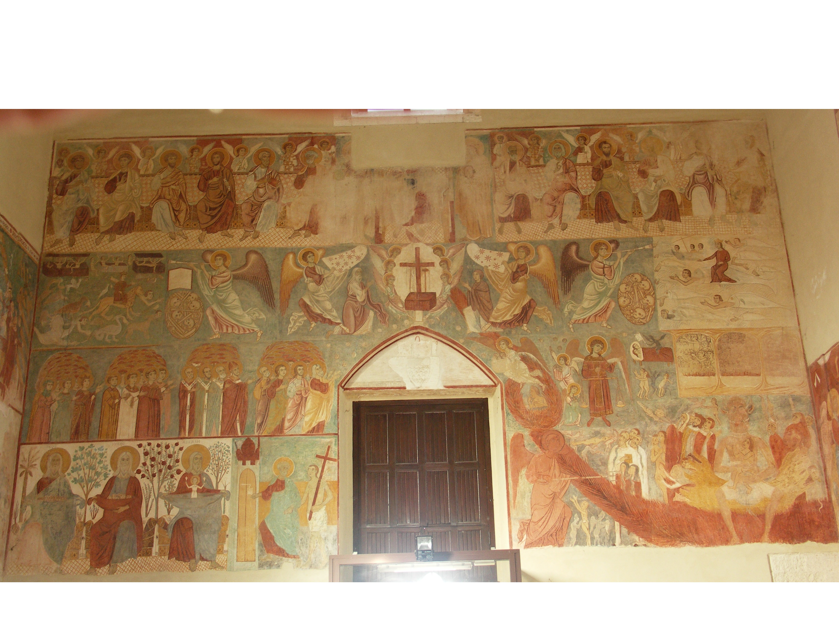 Il Giudizio Finale sulla controfacciata della chiesa di Santa Maria del Casale, opera di Rinaldo da Taranto